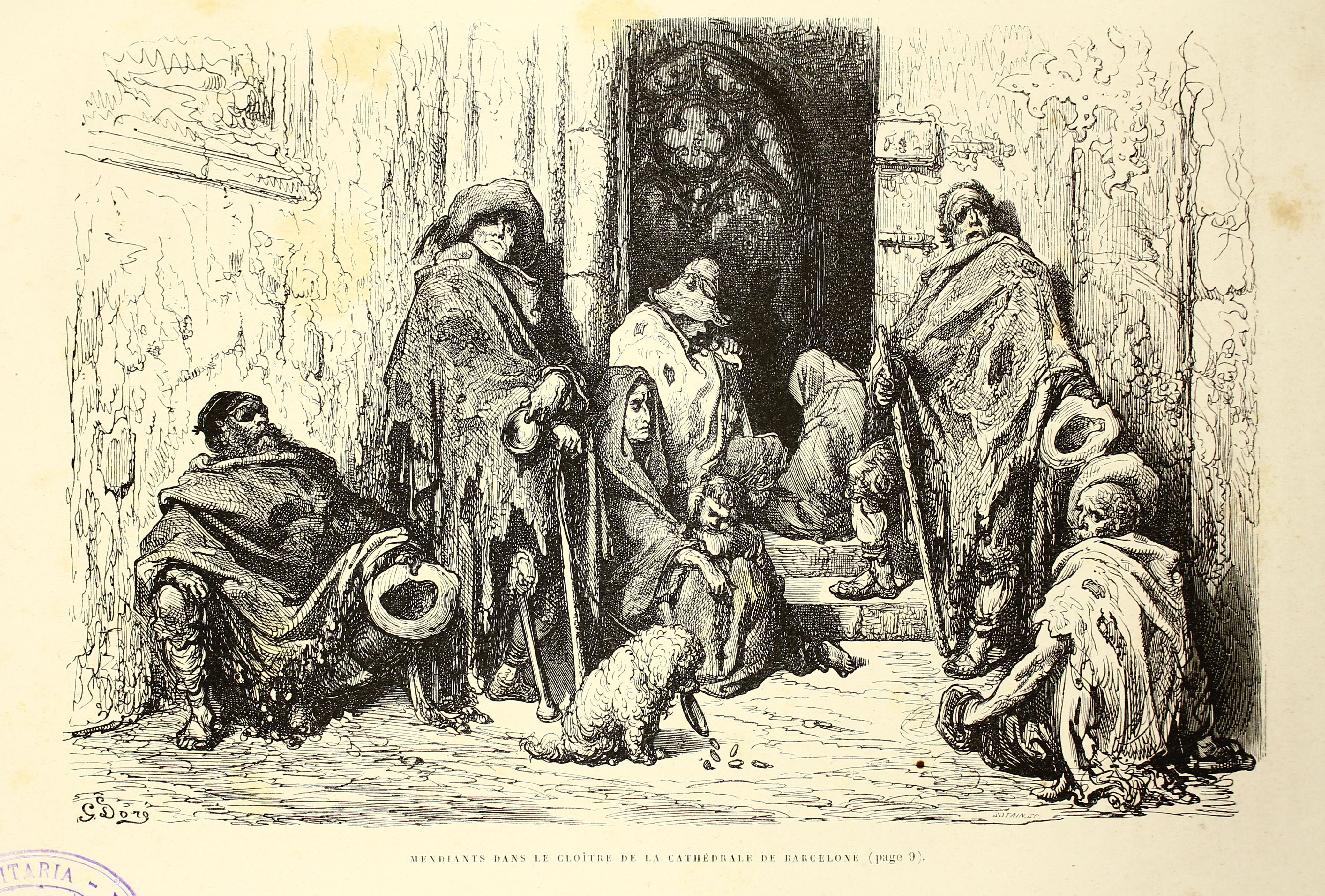 Autor: Davillier, Jean Charles, barón, 1823-1883 Descripción bibliográfica: L'Espagne / par Le Baron CH. Davillier ; ilustrée de 309 gravures dessinées su bois par Gustave Doré. - Paris : Librairie Hachette, 1874. - 799 p. : il. Materia: España- Geografía Materia: España- Usos y costumbres Ilustrador: Doré, Gustave, 1832-1883 Editor: Libreria Hachette Lugar de impresión: Francia, París Localización: Libro completo